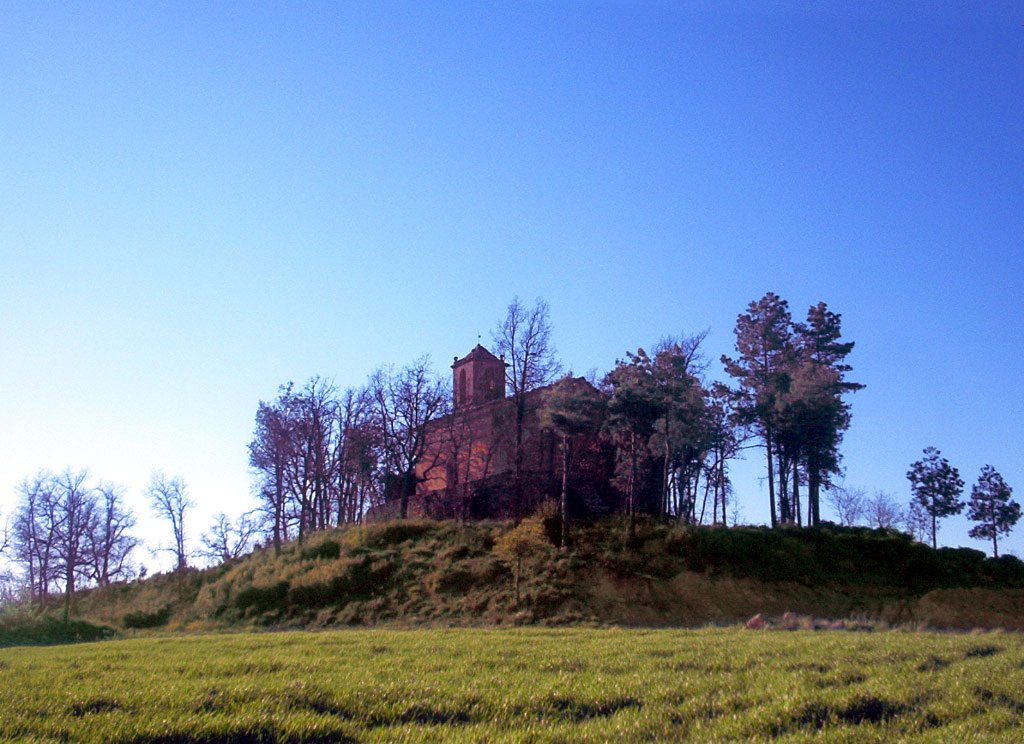 Sant Jaume de Riner: dalt d'un pujolet, prop de Riner, al Solsonès hi podem veure aquesta característica església, envoltada d'uns arbres que van sobreviure a l'incendi de 1999.